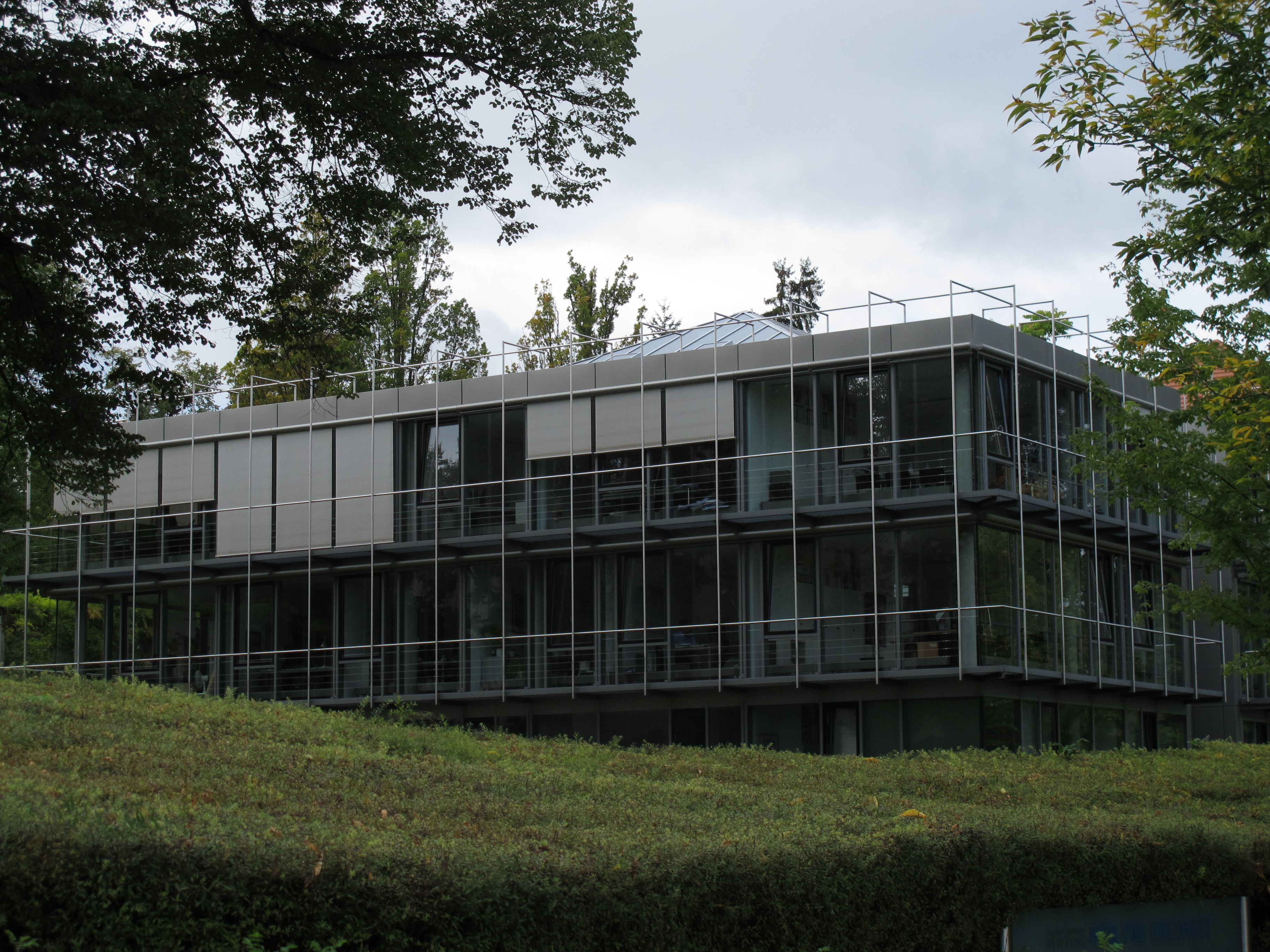 Sitz der Friedrich-Naumann-Stiftung für die Freiheit in Potsdam-Babelsberg